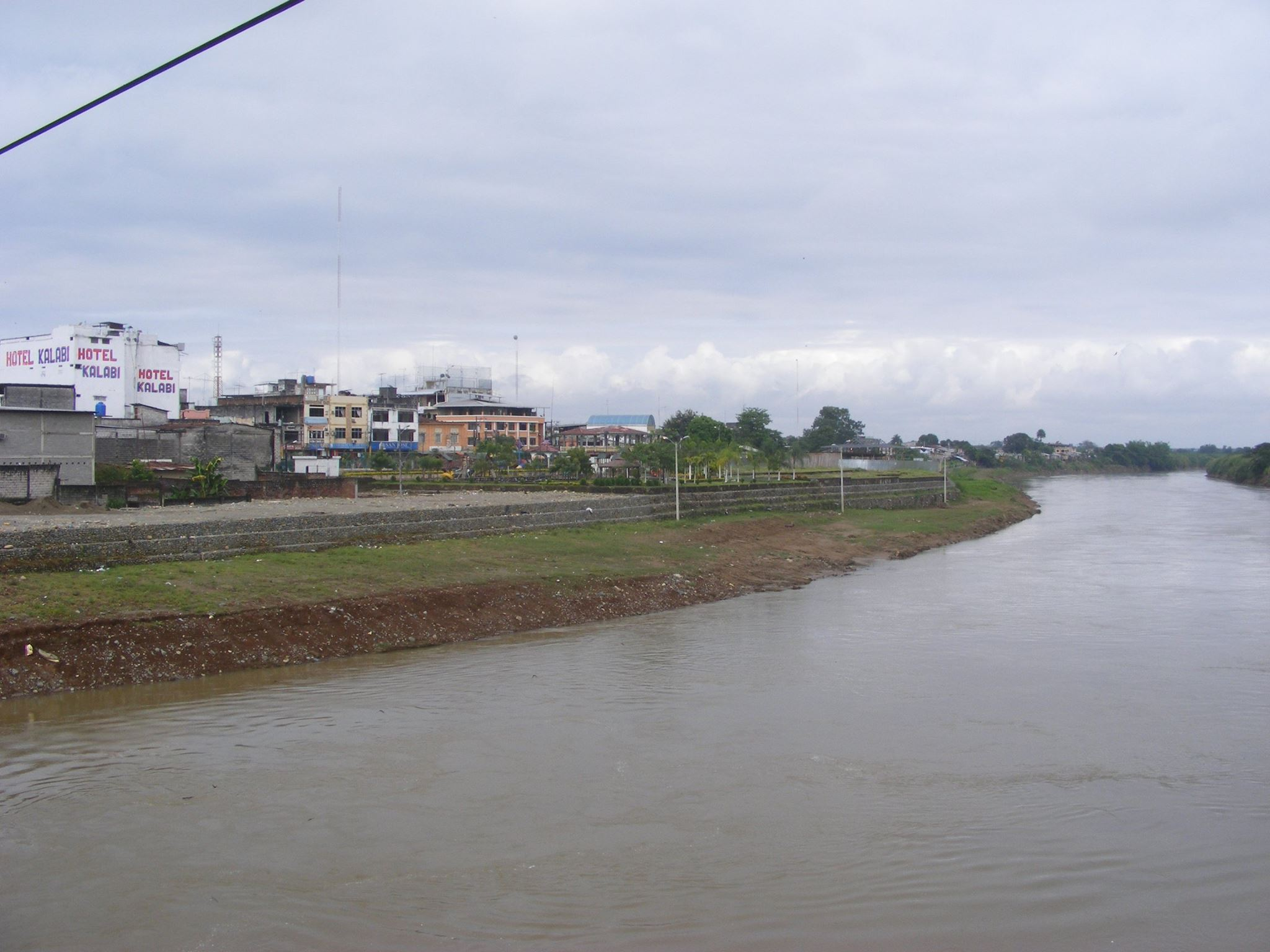 Malecón de Ventanas